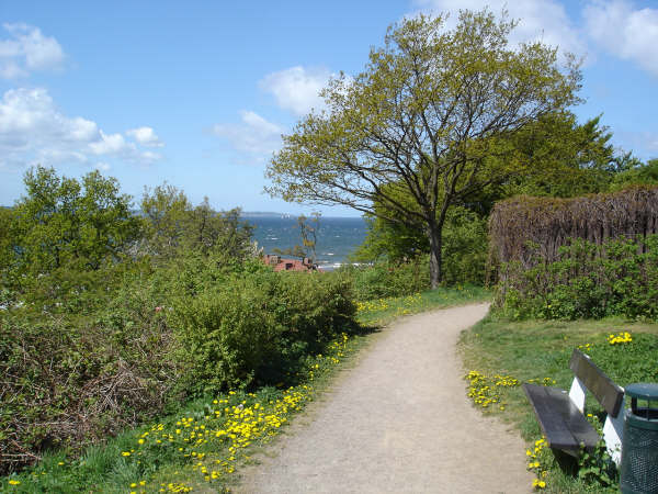 View from Landborgspromenaden in Helsingborg